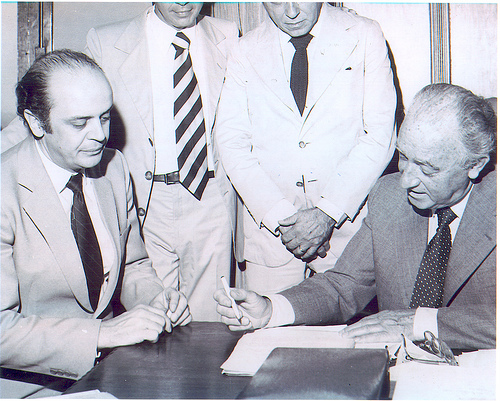 José Serra com Franco Montoro.